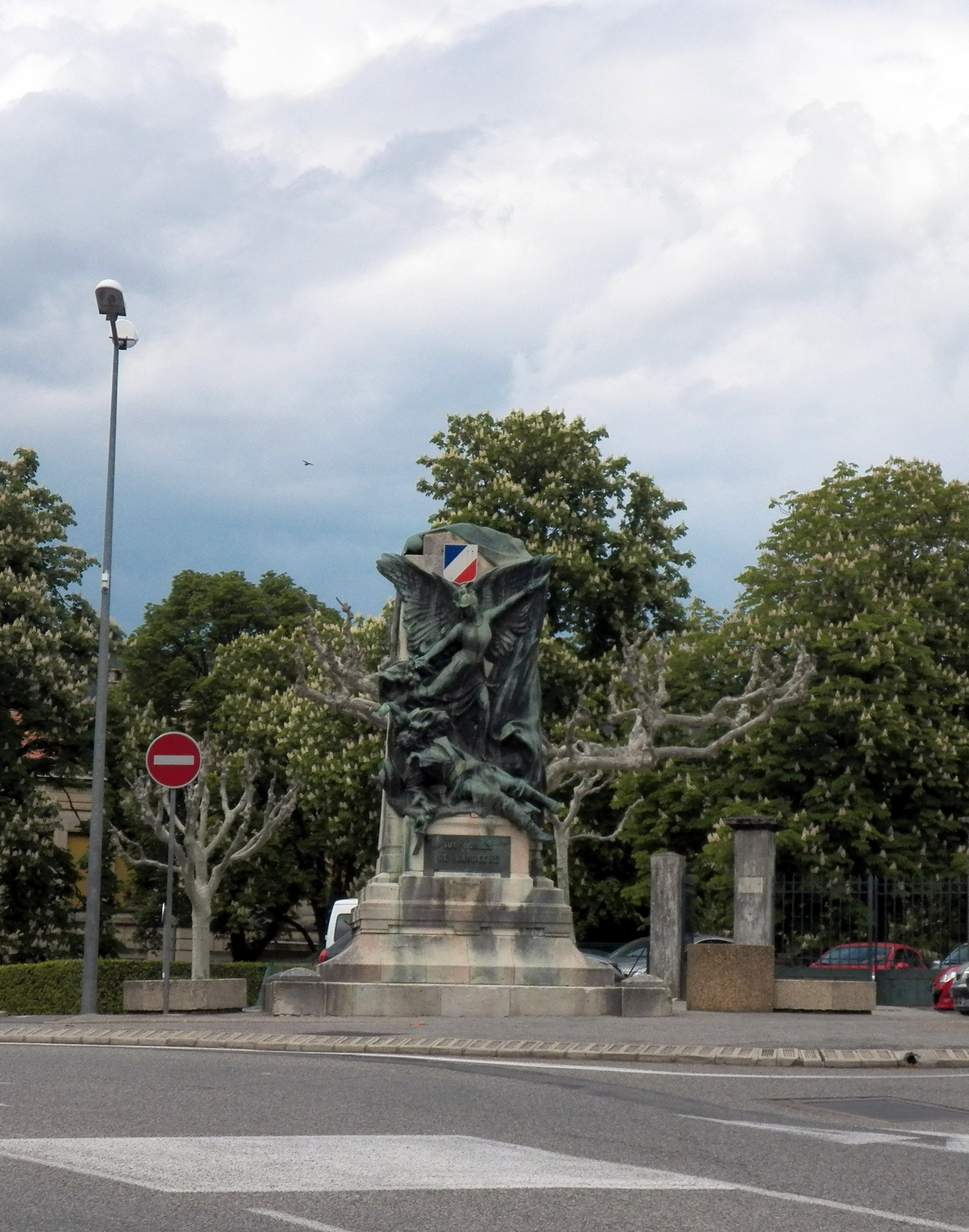 Monument aux mobiles de l'Ardèche (Guerre de 1870)